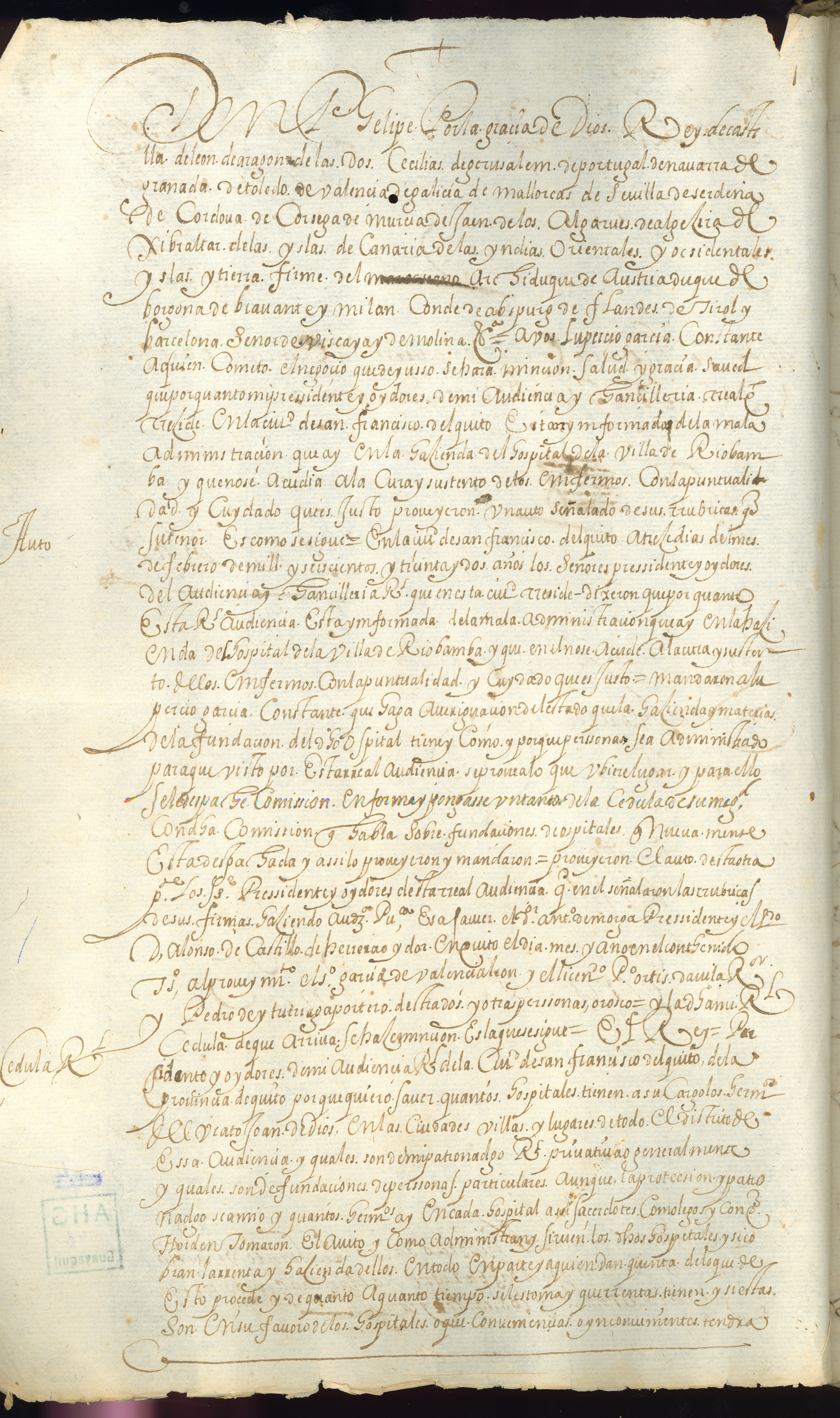 Cédula Real concedida por Su Majestad Católica Don Felipe Cuarto a la Villa del Villar Dom Pardo (Riobamba) en el distrito de la Real Audiencia de Quito. Diapositiva de Consulta publica custodiada en los Fondos Documentales del Archivo Histórico del Guayas (AHG); Guayaquil, Ecuador.Consultado y compartido por el usuario J. Javier García A.